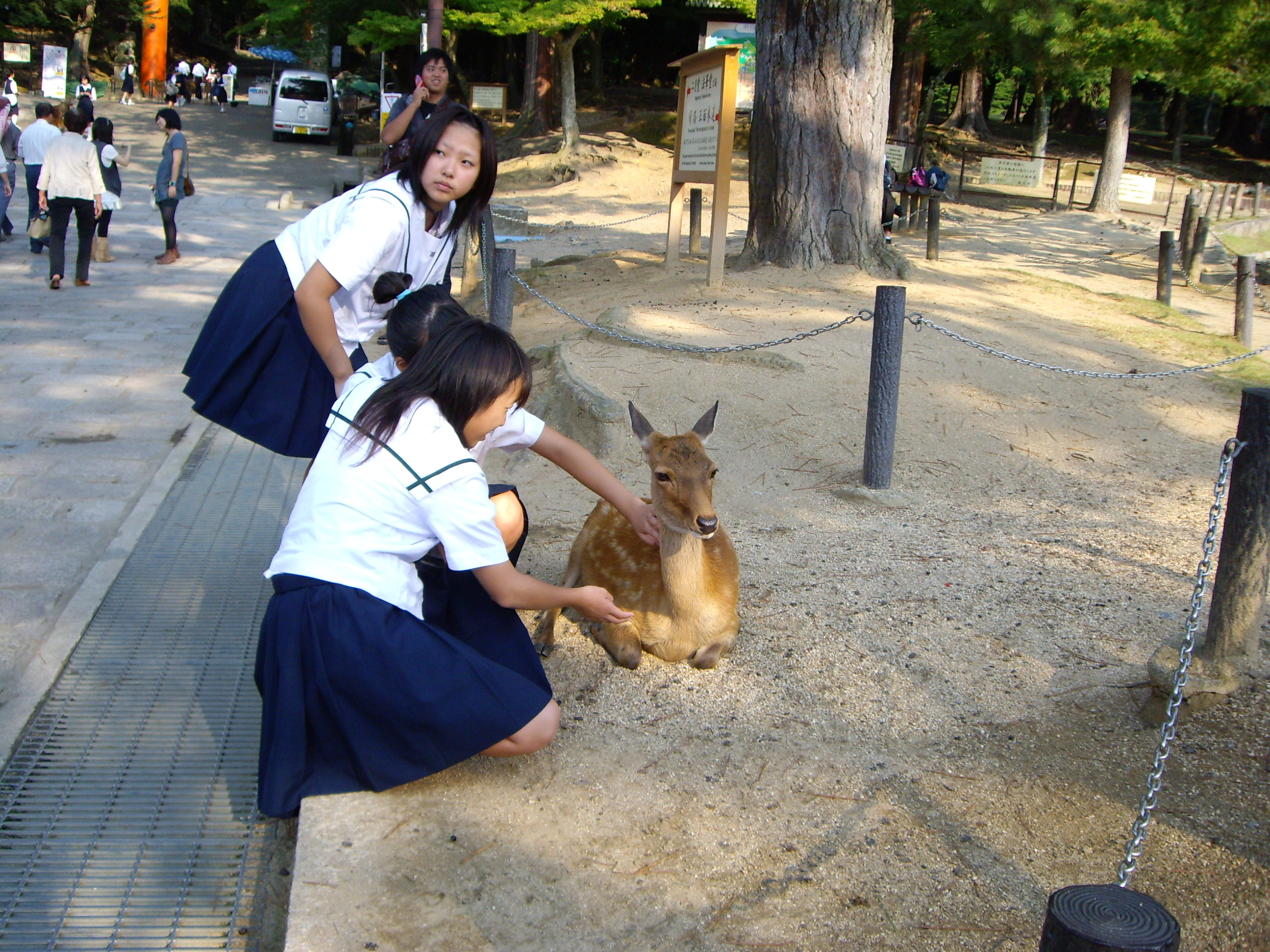 Un ciervo en Nara (Japón), siendo acariciado por unas colegialas japonesas.